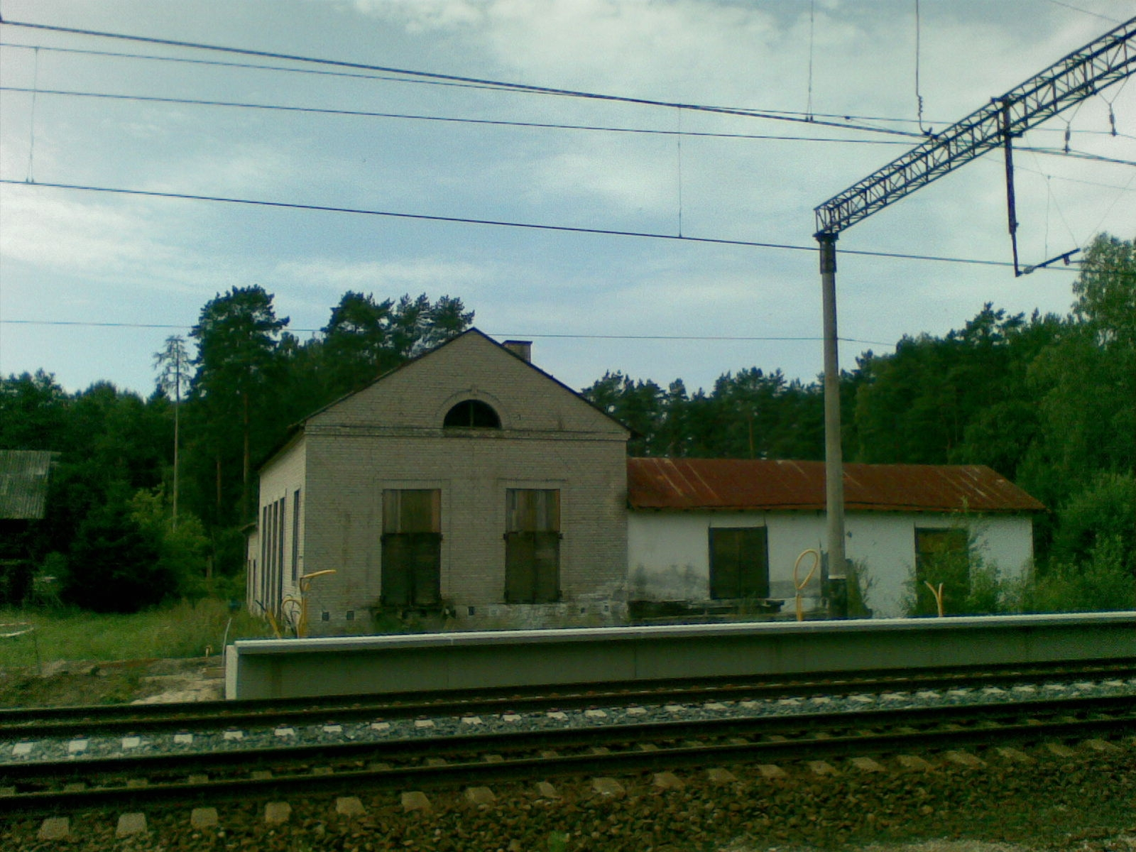 Mustjõe endine hapnikuvabrik Mustjõe raudteepeatuse juures